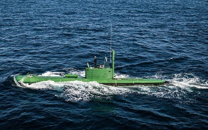 غدیر - رژه پایانی رزمایش دریایی ولایت ۹۴